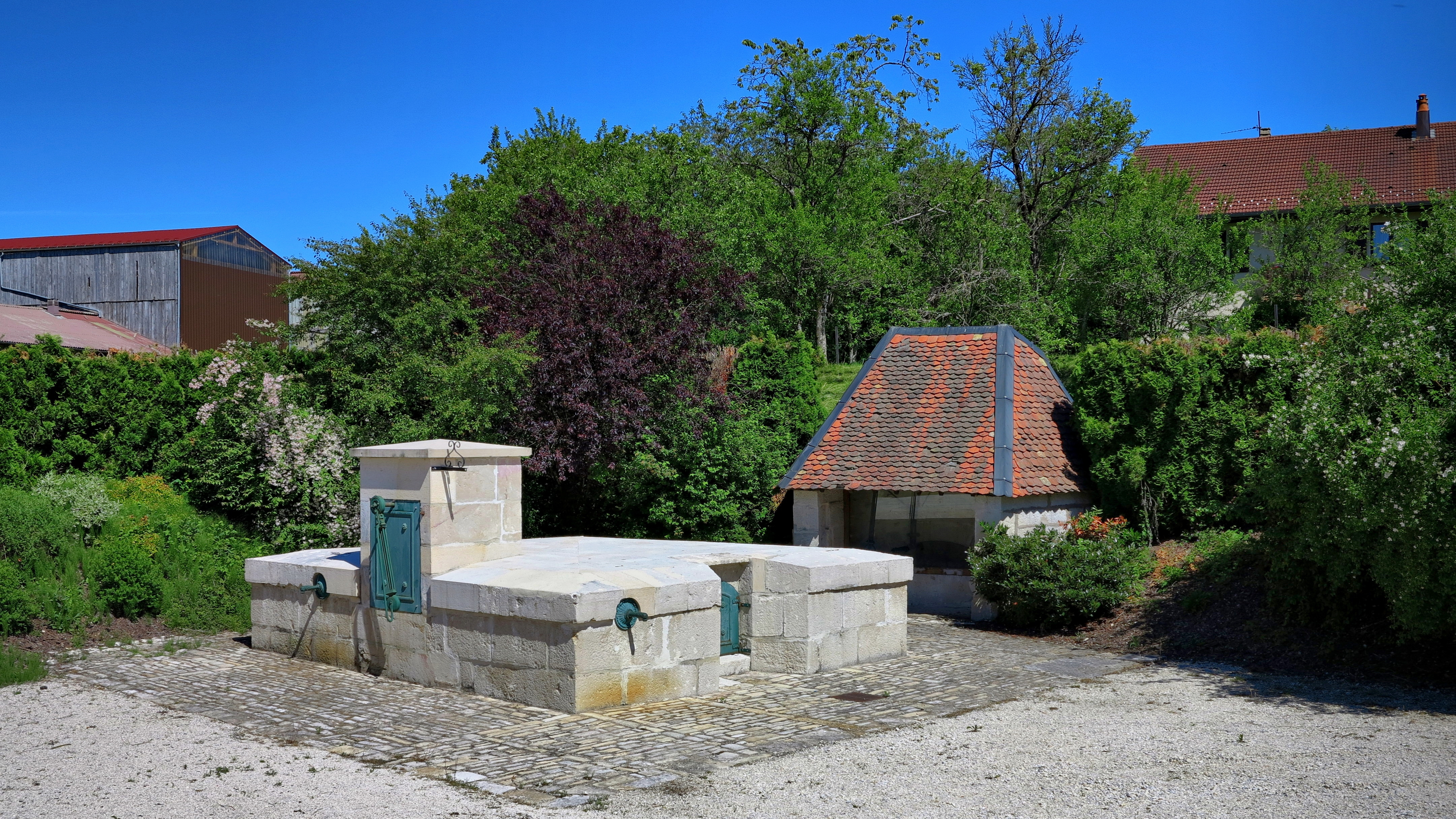 La fontaine du village